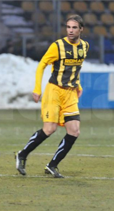 Diogo Silva FC Brasov